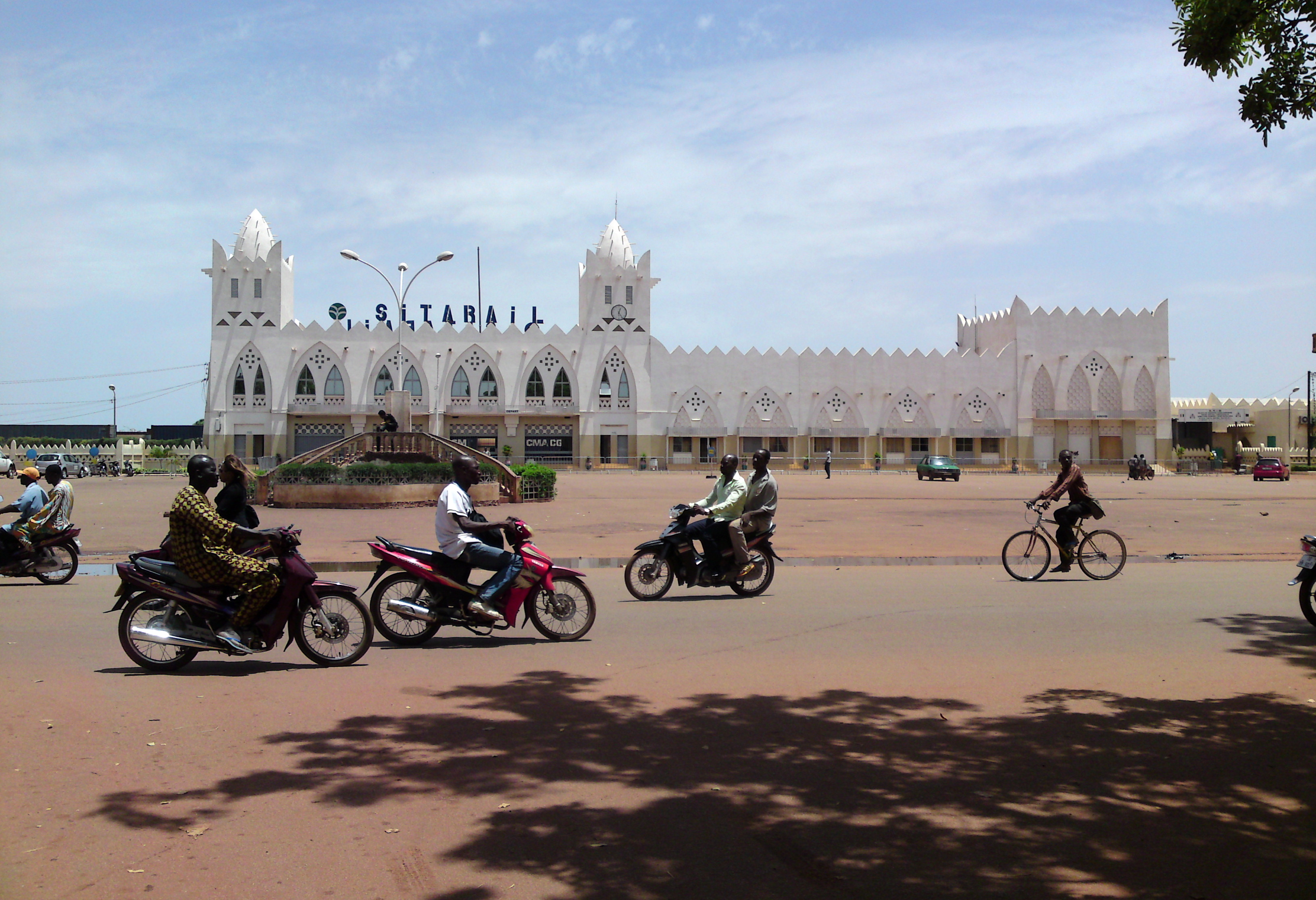 Gare de Bobo-Dioulasso